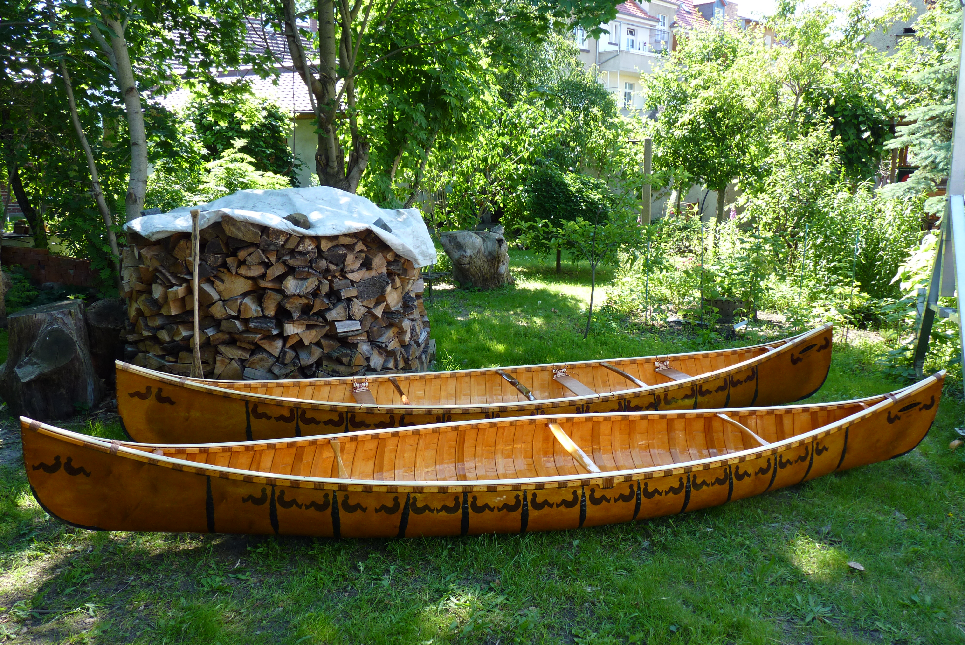 Holzrahmen-Birkenrindenboote nach Originalbauplänen der nordamerikanischen Ureinwohner